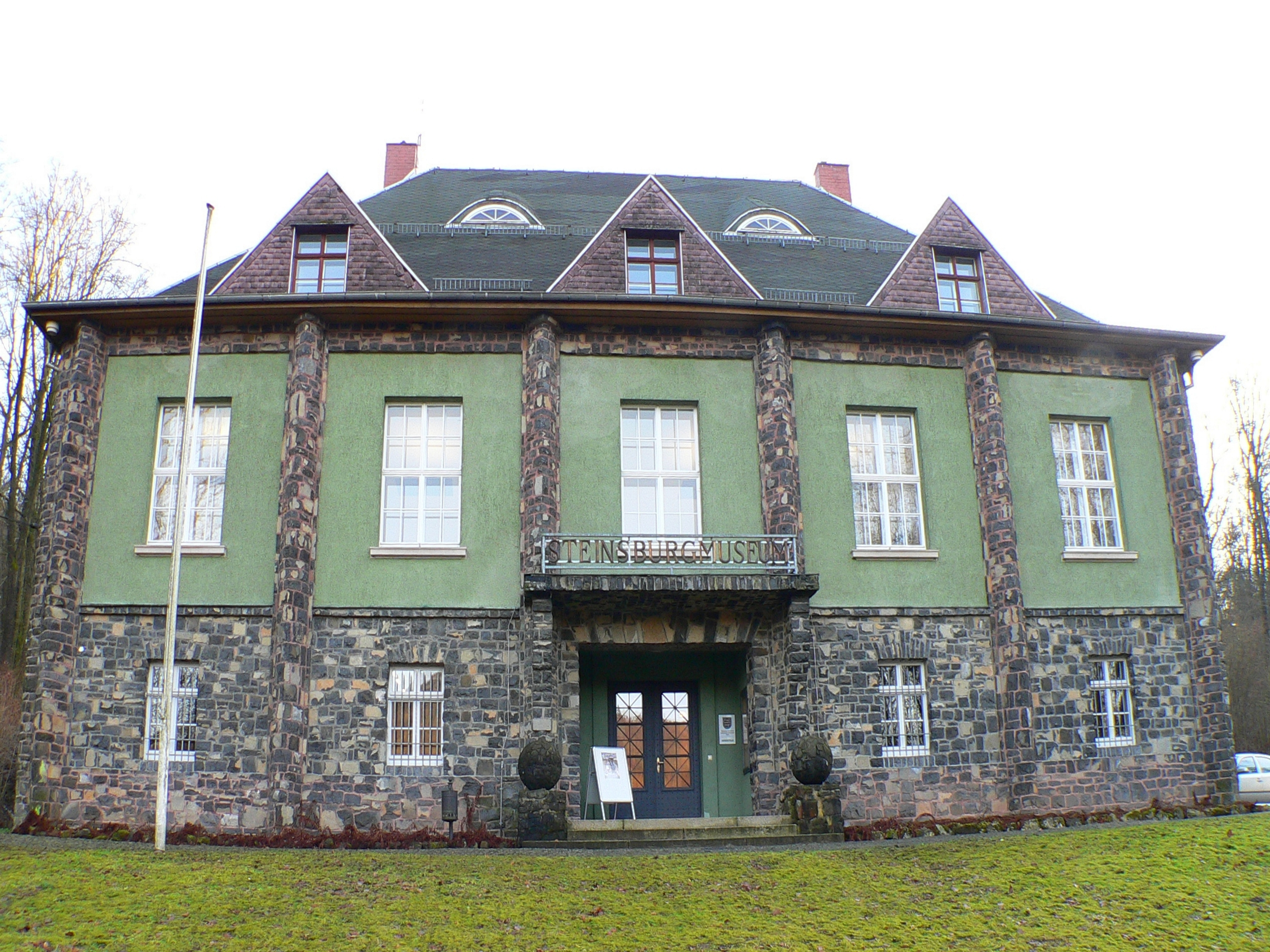 Nordansicht des Steinsburgmuseums in Römhild (Ortsteil Waldhaus) - Thüringen, Deutschland